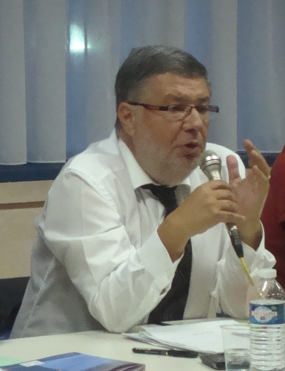 Alain Vidalies lors d'un débat sur les retraites à La Courneuve